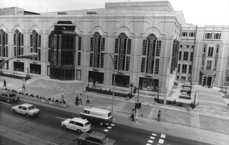 Berlin, Friedrichstadtpalast ADN-ZB Junge 26.4.84 Berlin: Zur Eröffnung des Friedrichstadtpalastes - Die Fassade des neuen Friedrichstadtpalastes in der Friedrichstrasse 107, ist als geschlossener Baukörper aus Sichtbeton gestaltet. Es wurden geschoßliche Stahlbetonelemente entwickelt und in Betonmatritzen gefertigt. Außerdem sind in die Fassade Betonglaselemente eingebaut, durch die abend das Licht nach außen dringt. (siehe Fotos 24-31 N) Sperrfrist 28.4.84, 04.00 Uhr !